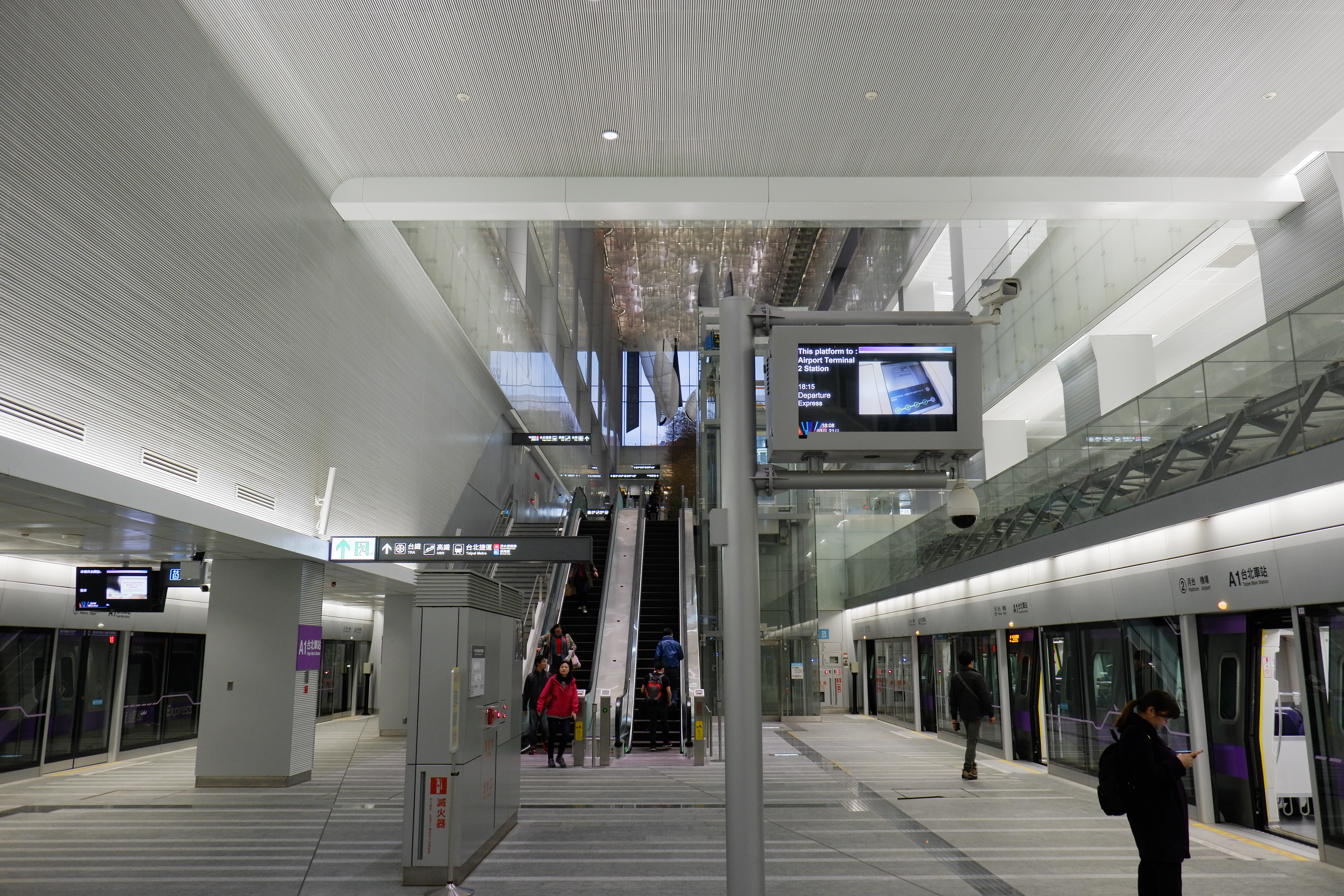 桃園捷運台北車站第一月台（左）與第二月台（右）。